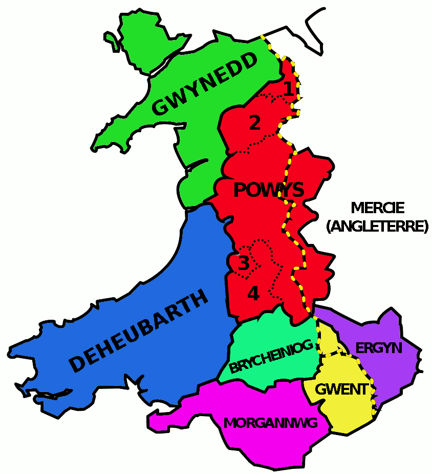 Anciens royaumes du Pays de Galles avec détail sur les sous-royaumes du Powys Auteur : Francis McCarthy ( Crée avec The Gimp le 09/11/2005 Note : if you are interested in translating this map, ask me to e-mail you the original *.xcf file which will enable you to edit directly the text without touching the background.